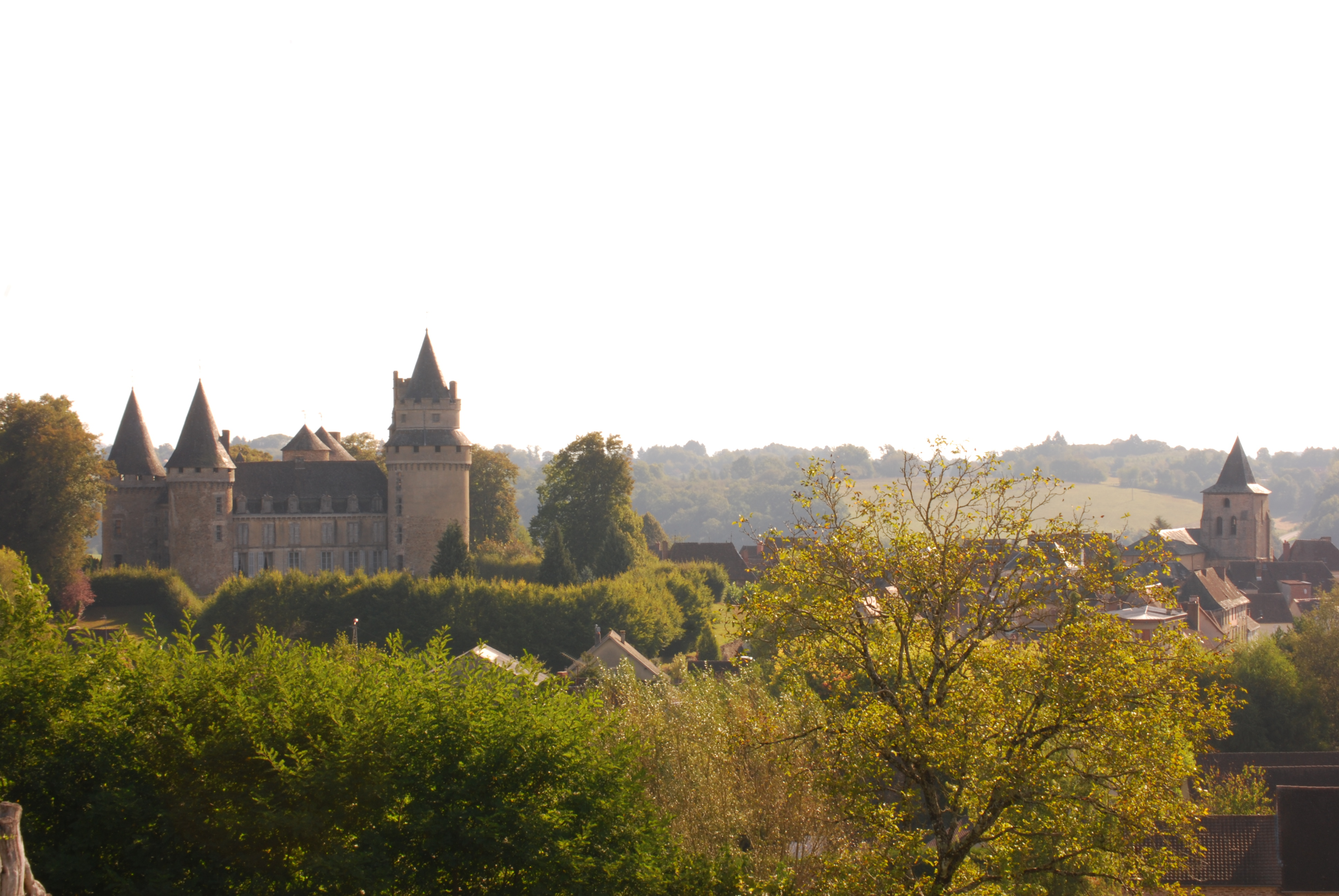 Château de Coussac-Bonneval